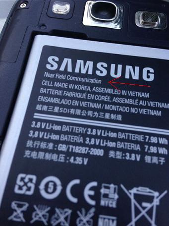 NFC Schnittstelle Samsung für den WikiEintrag TecTiles